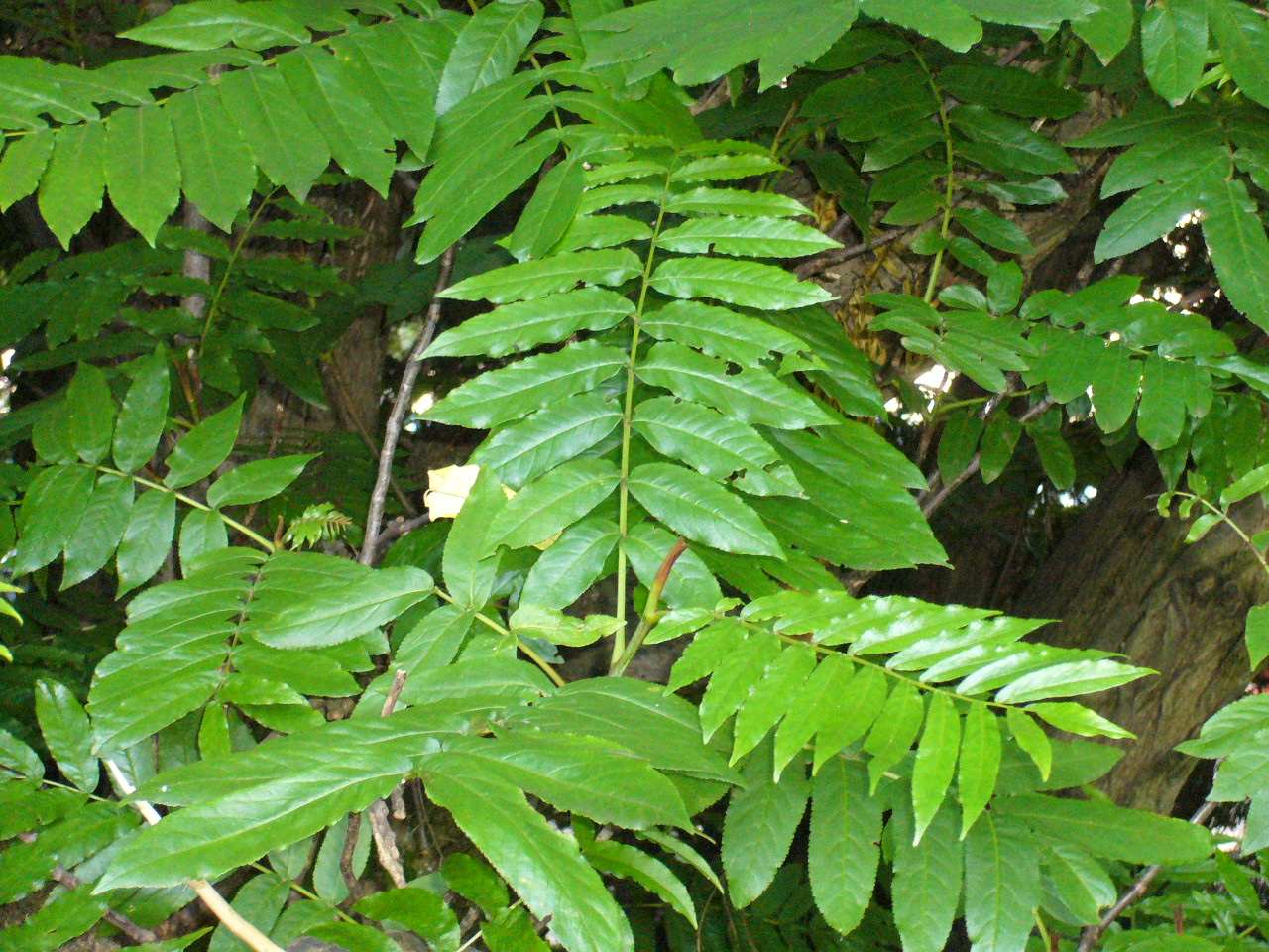 Pterocarya fraxinifolia: Leaves